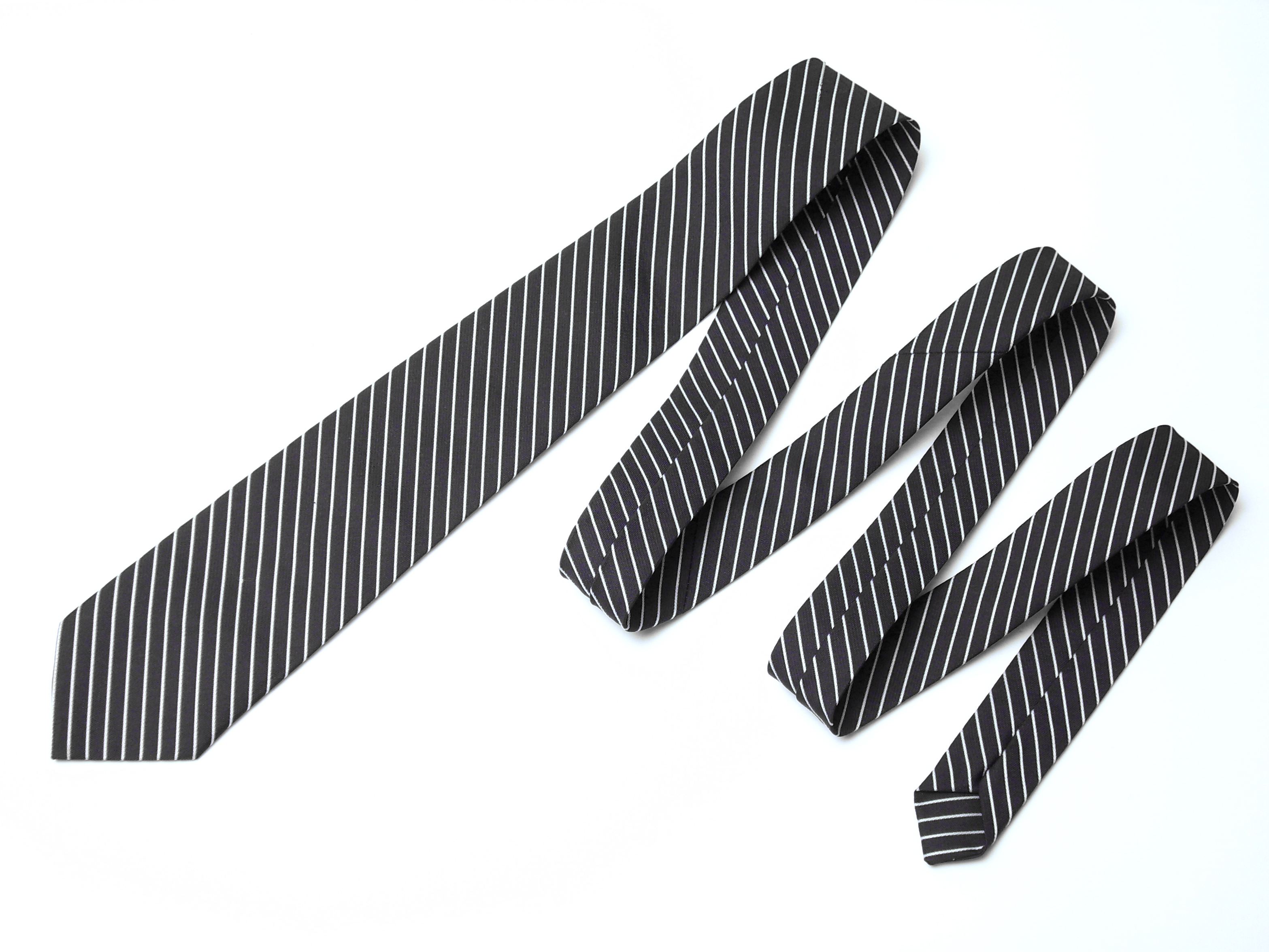 Una corbata azul marino con líneas blancas.